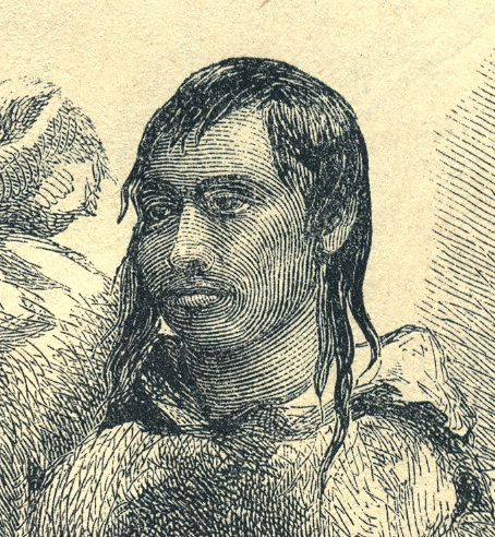 "Joe" Ebierbing, Inuit guide and hunter